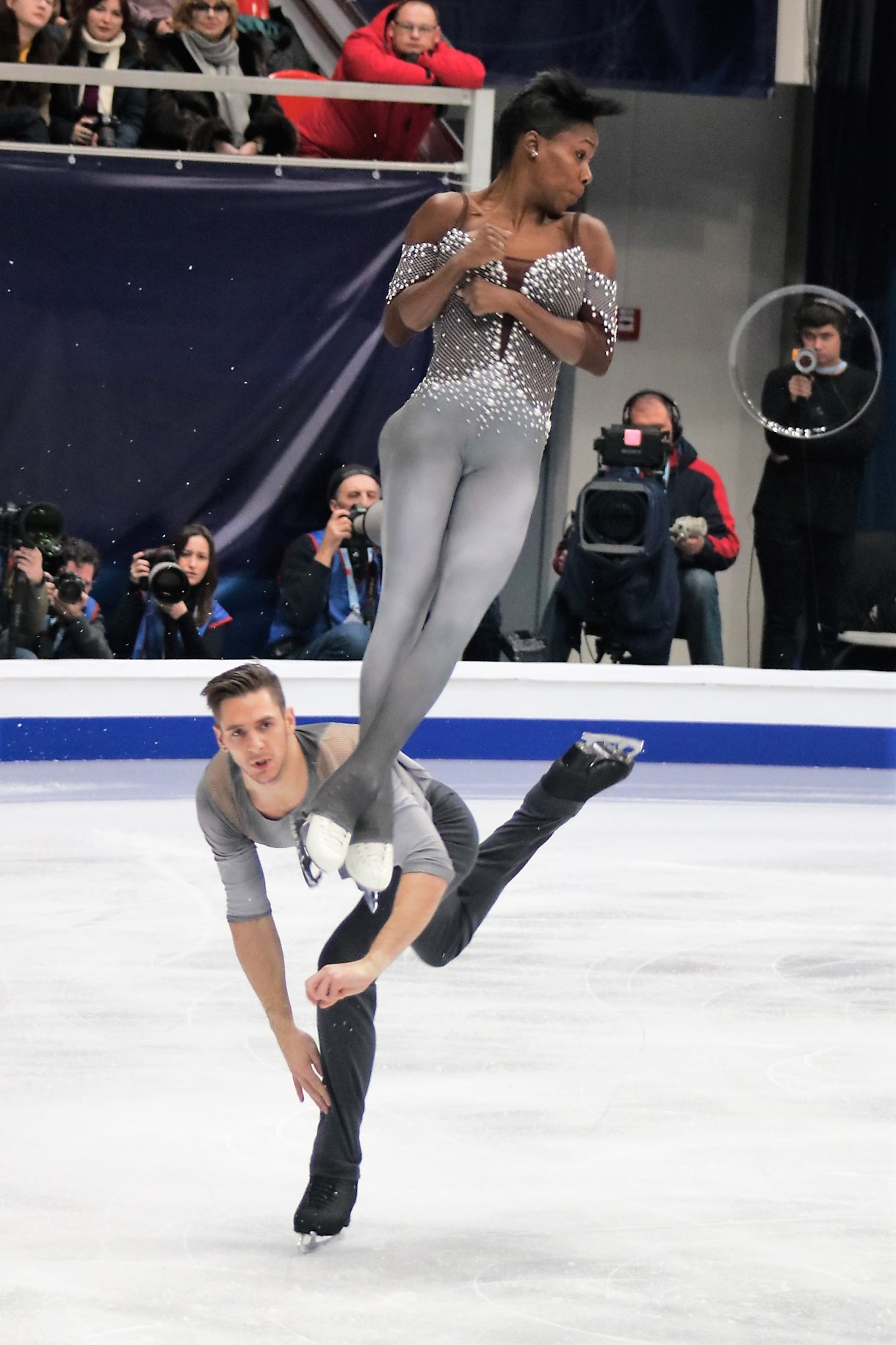 Ванесса Джеймс / Морган Сипре (Франция) на Чемпионате Европы по фигурному катанию 2018.